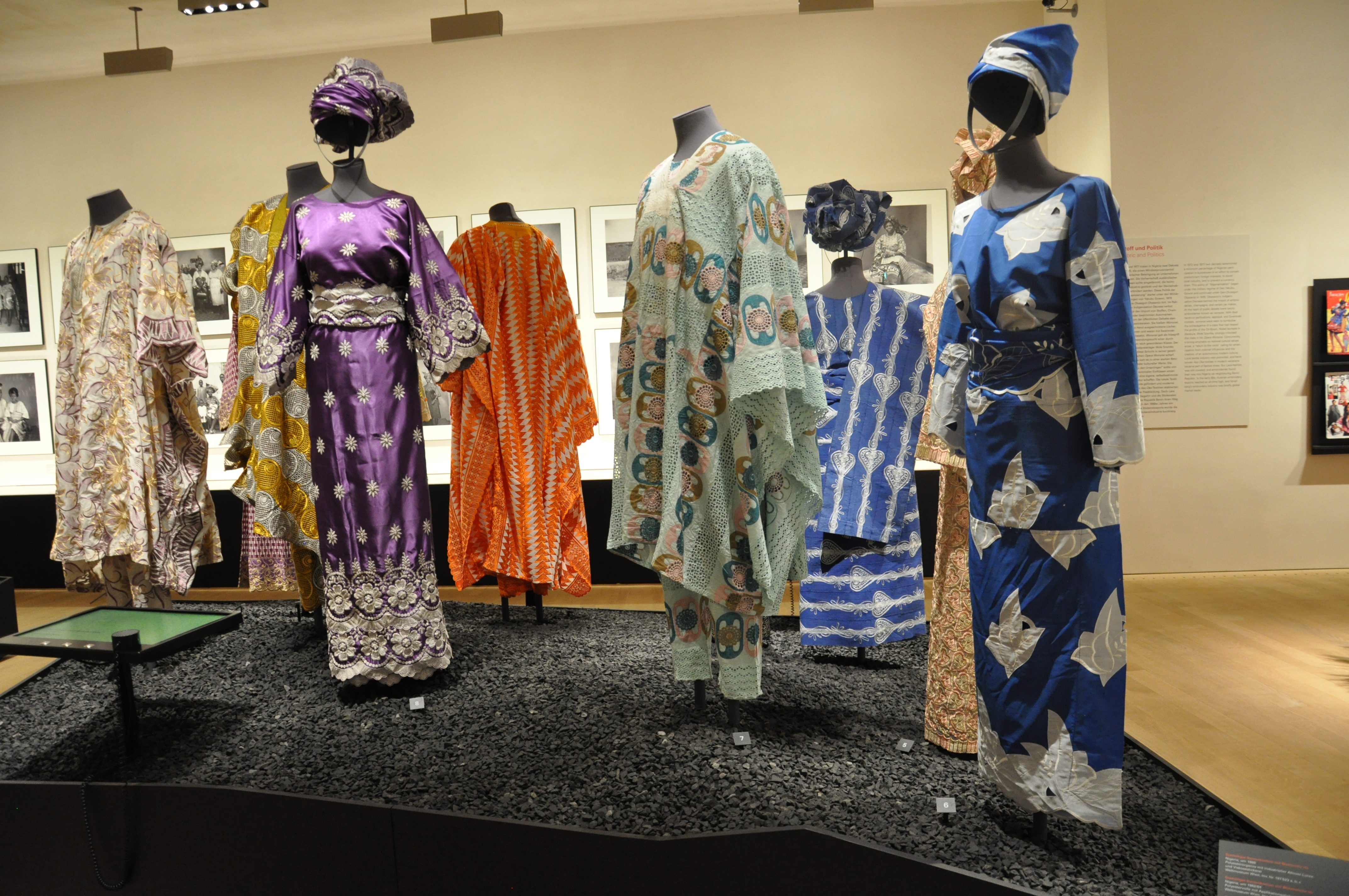 Links (Nr. 8): Dreiteiliges Damenkostüm mit silbernem Blumenmotiv; Nigeria, Mitte 1980er Jahre; Polyestersatin mit industrieller Allover-Lurexstickerei; Weltmuseum Wien, Inv. Nr. 187.516 a,b,c Mitte (Nr. 7): Dreiteilges Herrenensemble mit ovalem Muster; Nigeria, frühe 1980er Jahre; Baumwollvoile mit Plattstich- und Lochstickerei, Ausschnitt der Tobe mit Handstickerei eingefasst; Weltmuseum Wien, Inv. Nr. 187.528 a,b,c Rechts (Nr. 6): Dreiteilges Damenkostüm mit Blütenmotiv; Nigeria, um 1982/1984; Polyestervoile mit Applikationsstickerei; Weltmuseum Wien, Inv. Nr. 187.534 a,b,c Fotografiert in der Ausstellung Lustenau Lagos African Lace im Vorarlberg Museum, Bregenz.